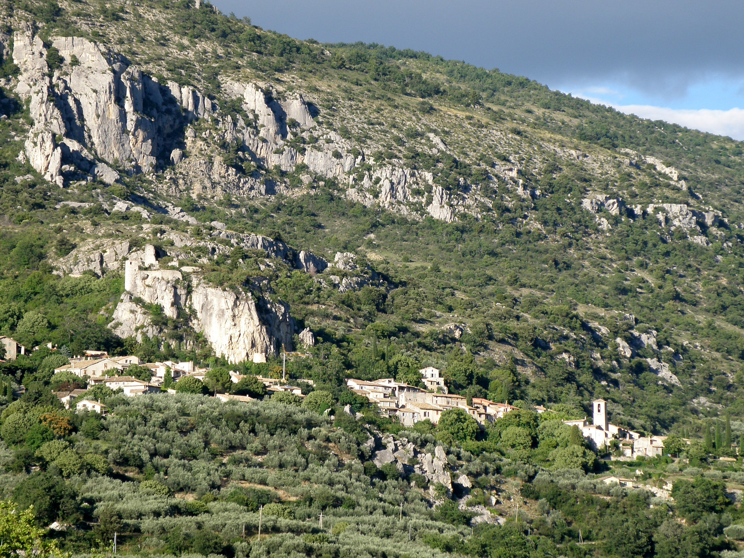 La Roche-sur-le-Buis (Drôme, France). Vue d'ensemble.